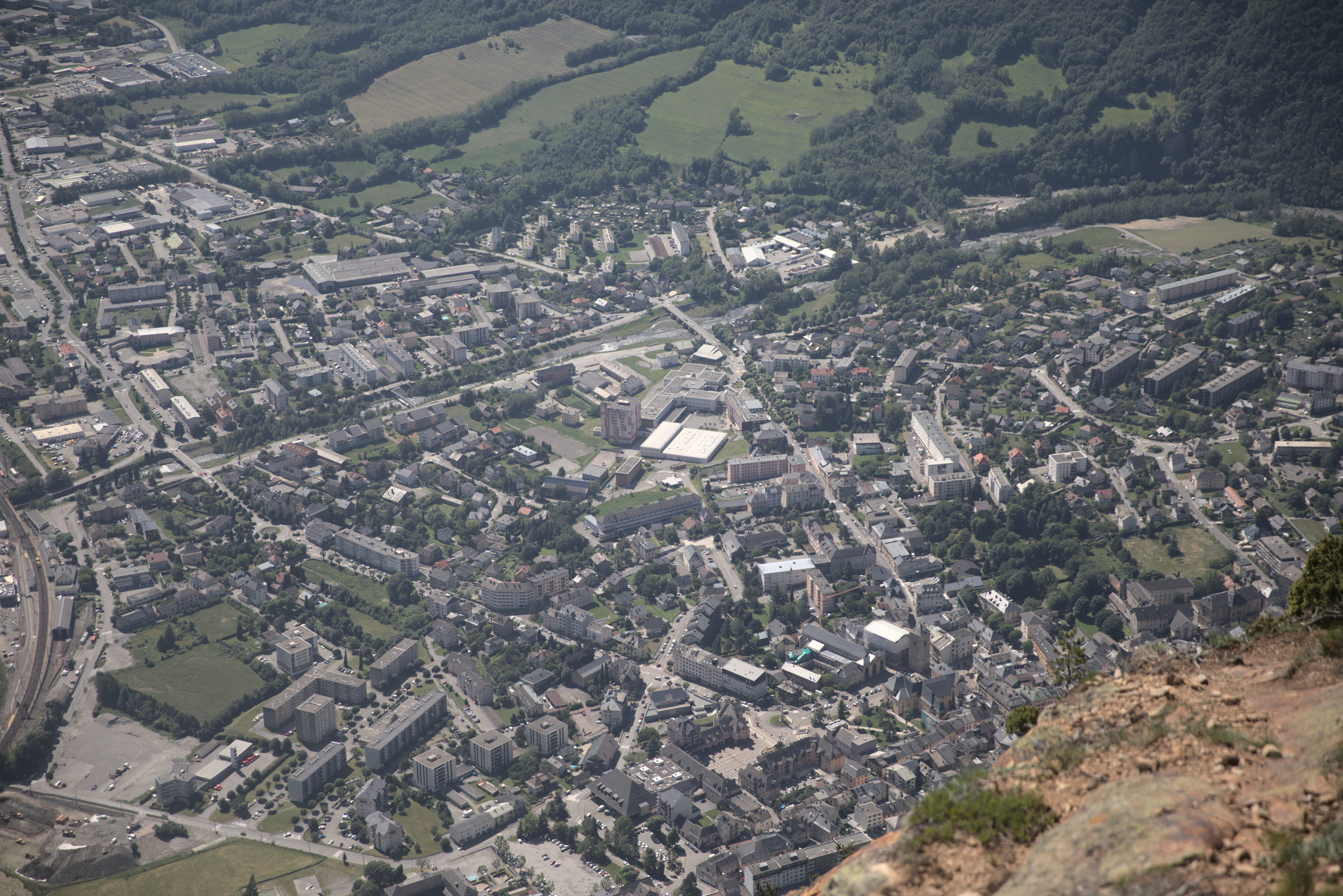 Vue de Saint-Jean-de-Maurienne depuis le Rocheray